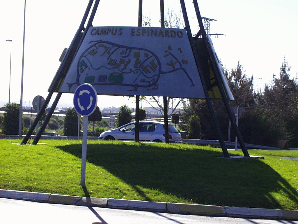 Vista de una parte de la estatua que hay justo en la entrada principal del Campus de Espinardo de la Universidad de Murcia